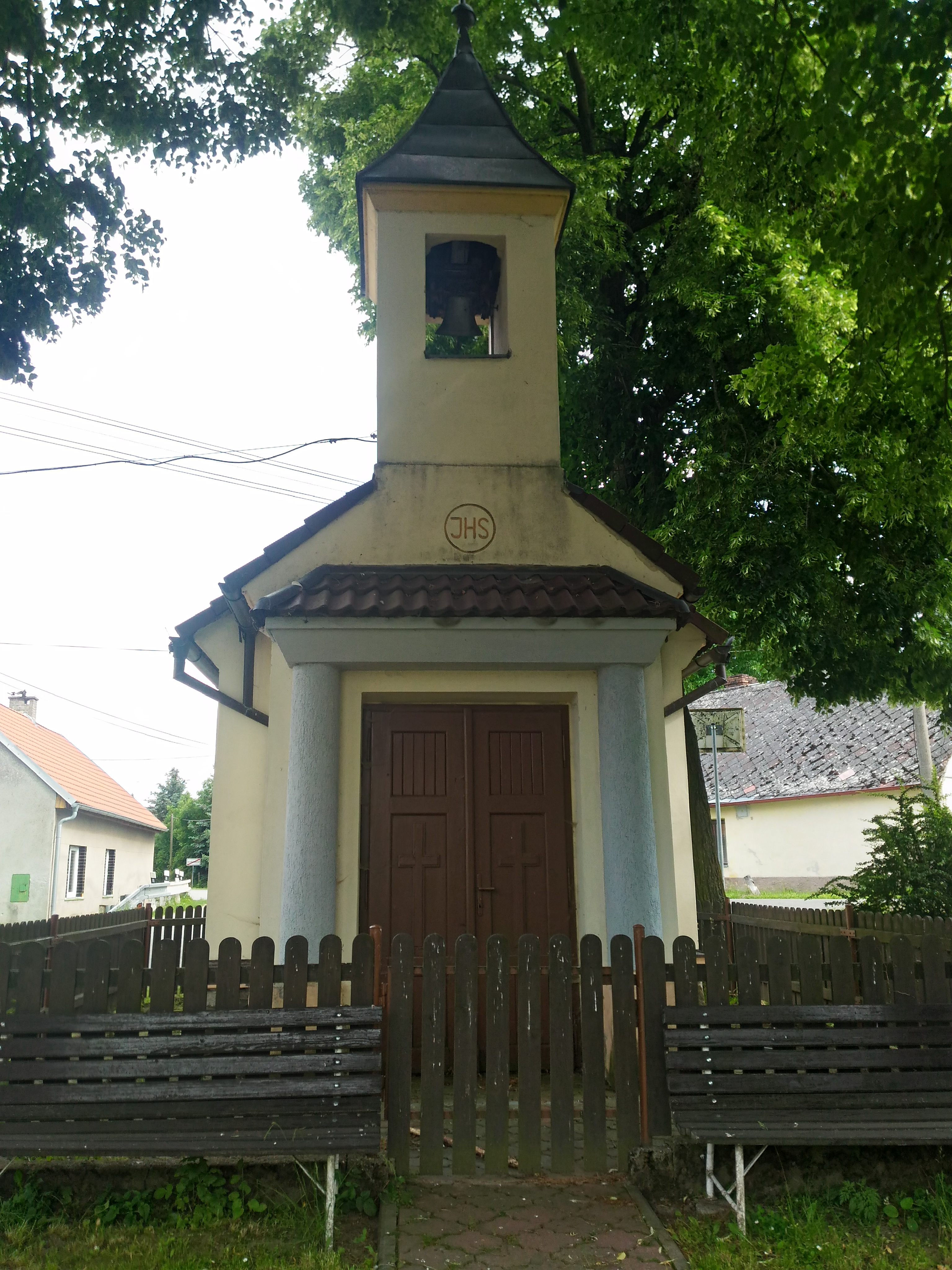 Svrabov, okres Tábor, Česká republika